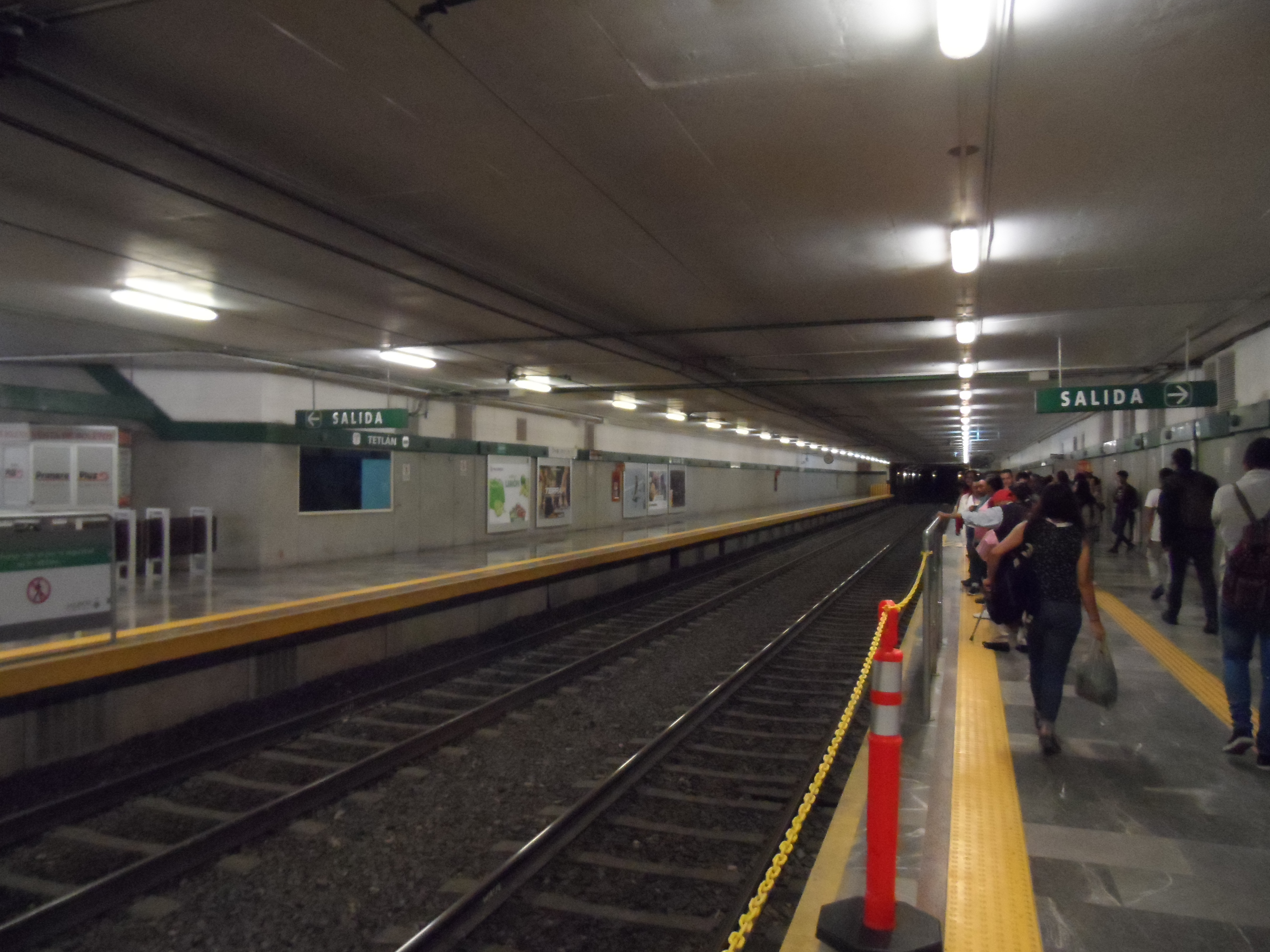 La estación "Tetlán" de la Línea 2 del Tren Ligero de Guadalajara.